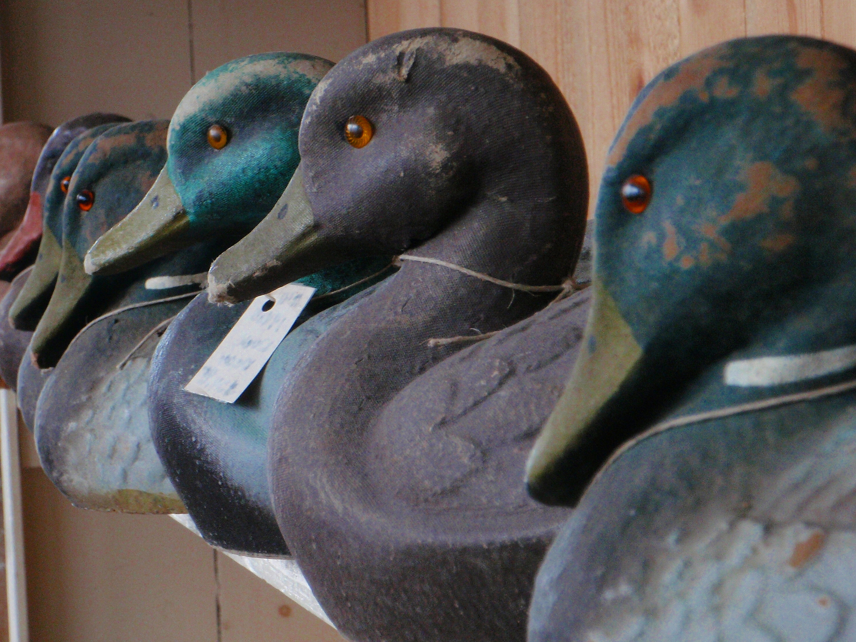 en: Duck decoyssv: vettar